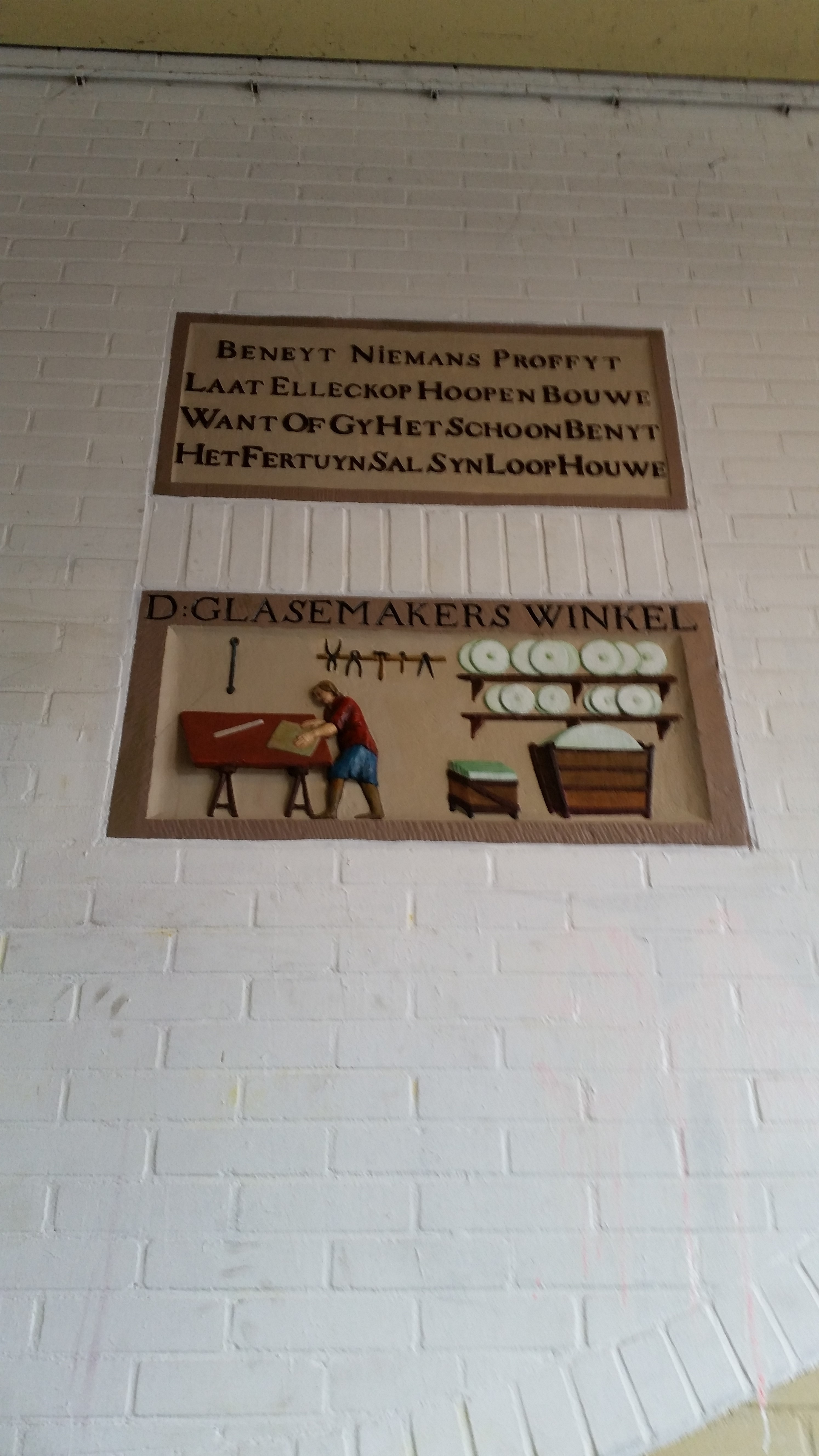 Fotoreportage van het gebouw Pentagon aan het gelijknamige plein in Amsterdam-Centrum gemaakt in november 2019